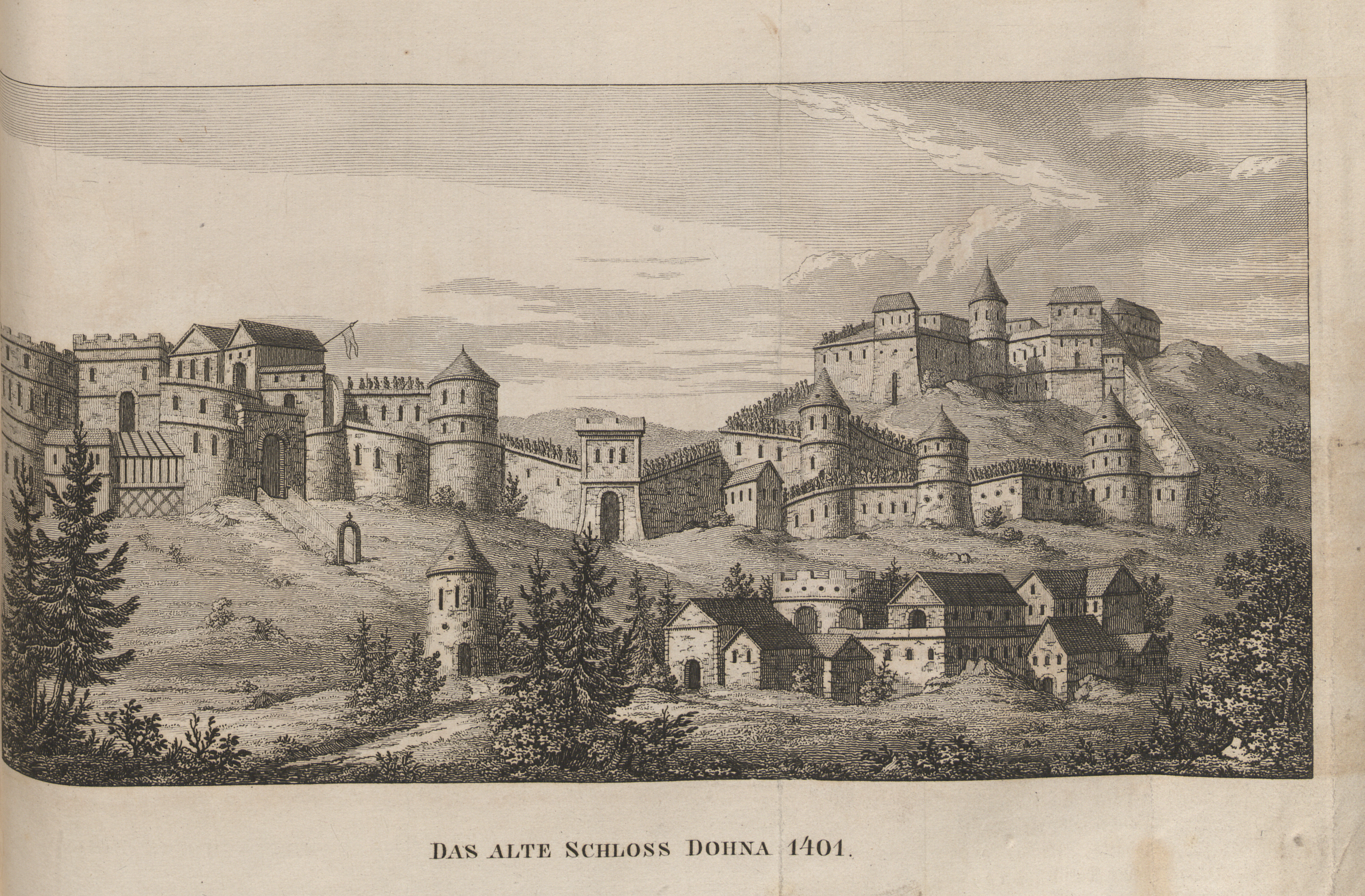 siehe Bildbeschreibung aus: Abbildungen von Dresdens alten und neuen Pracht-Gebäuden, Volks- und Hof-Festen. Untertitel: Kupferheft zur Chronik der Kgl. Sächs. Residenz-Stadt Dresden und des Sammlers für Geschichte und Alterthum, Kunst und Natur im Elbthale. Grimmer, Dresden 1835